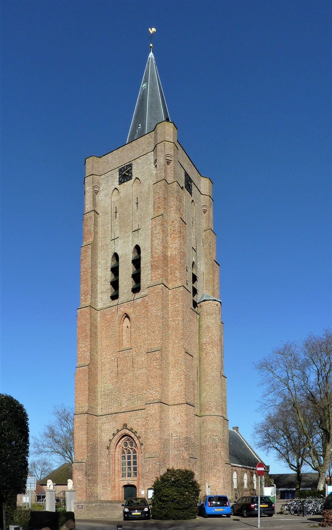 Protestantse Kerk (Oostkapelle)